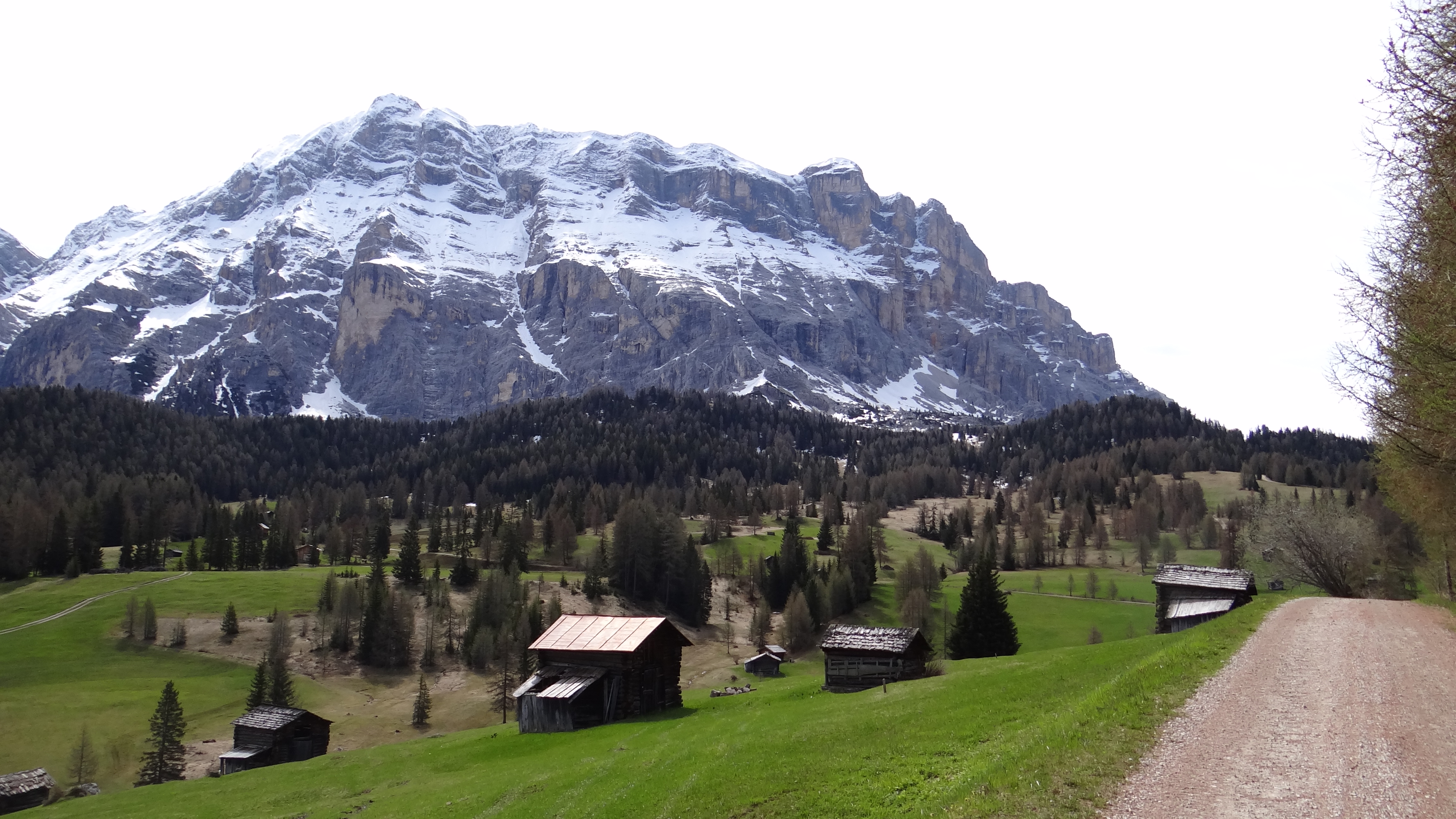 Prati dell'Armentara (Q49966964)